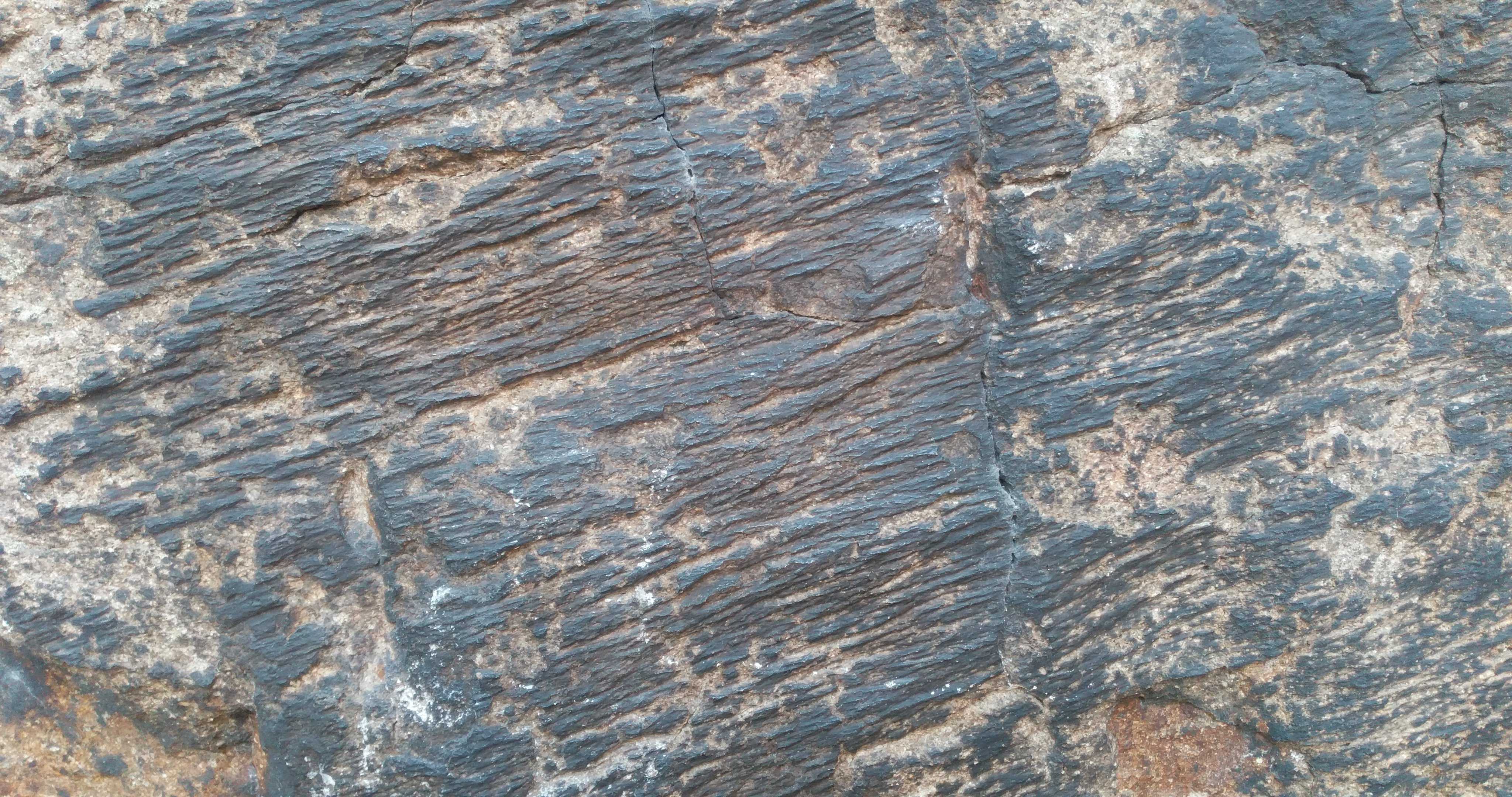 Windschliffe auf dem kleinen Berg in Hohburg, Sachsen, Deutschland